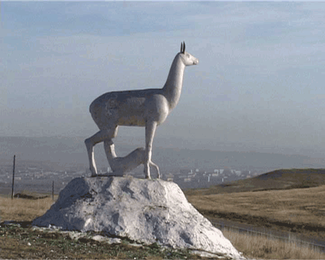 Символ Кызыла на въезде в город с Севера по М54